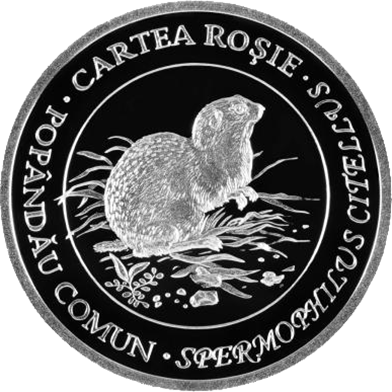 Реверс памятной монеты "Европейский суслик"